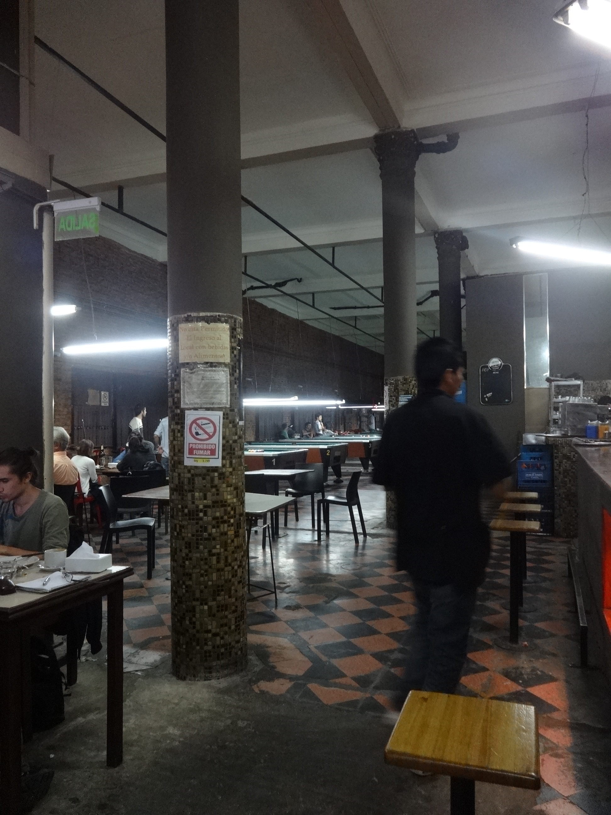 Sector del Café San Bernardo, en Avenida Corrientes 5436. Buenos Aires, Argentina.